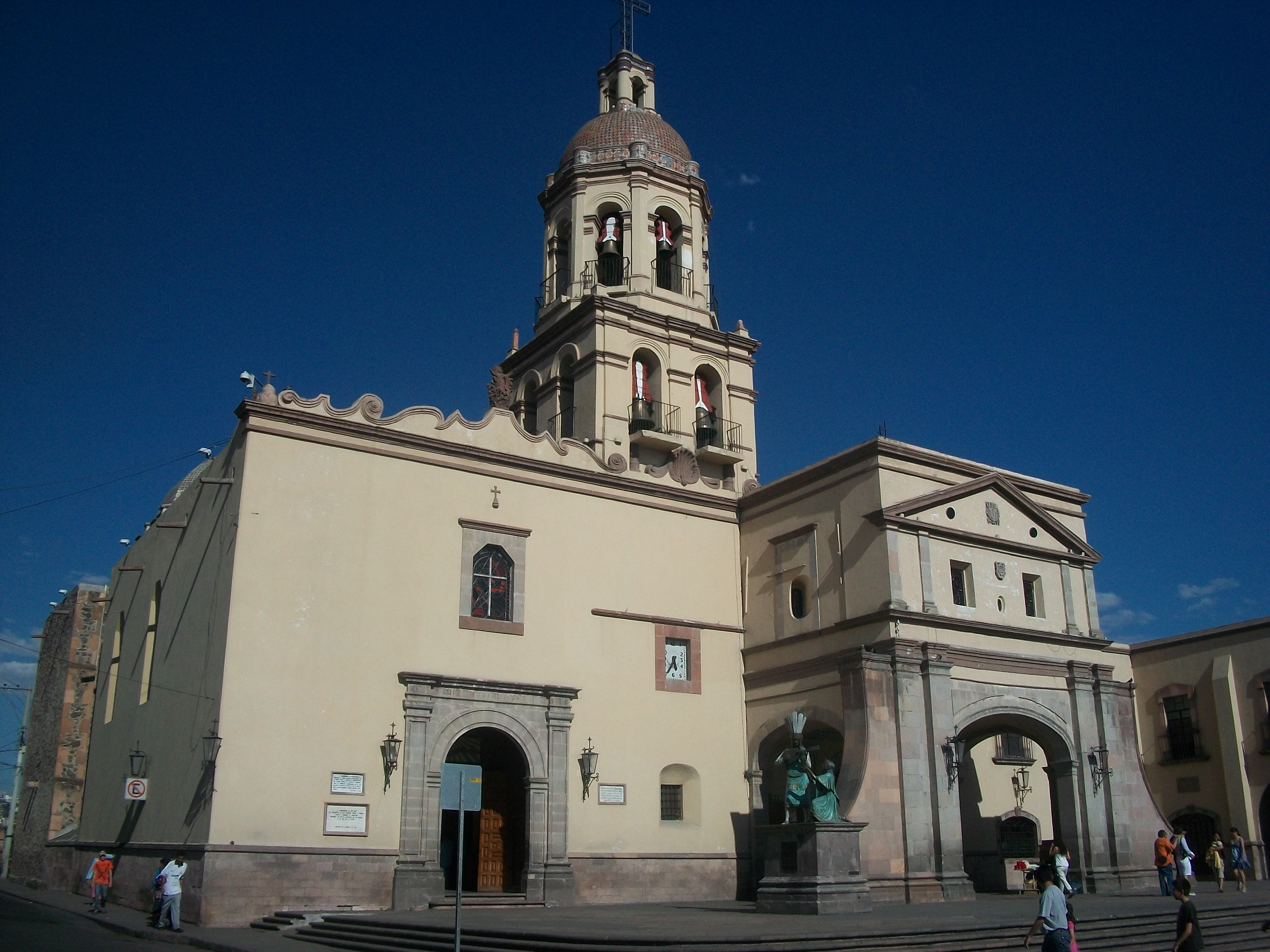 Fachada del Convento de la Cruz, Santiago de Querétaro, Municipo de Querétaro, Querétaro, México.